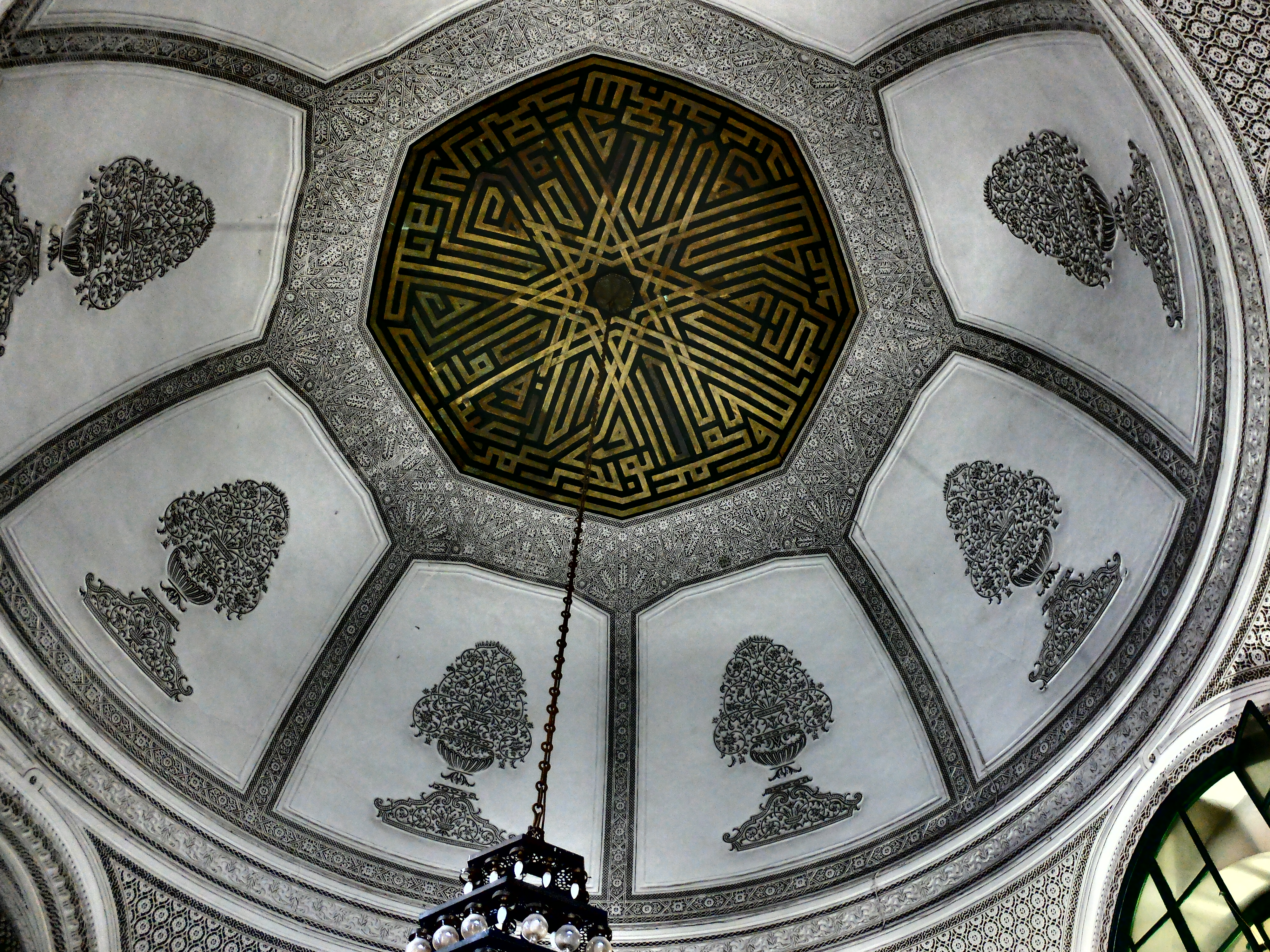 Zaoui Sidi Mahrez, Tunis